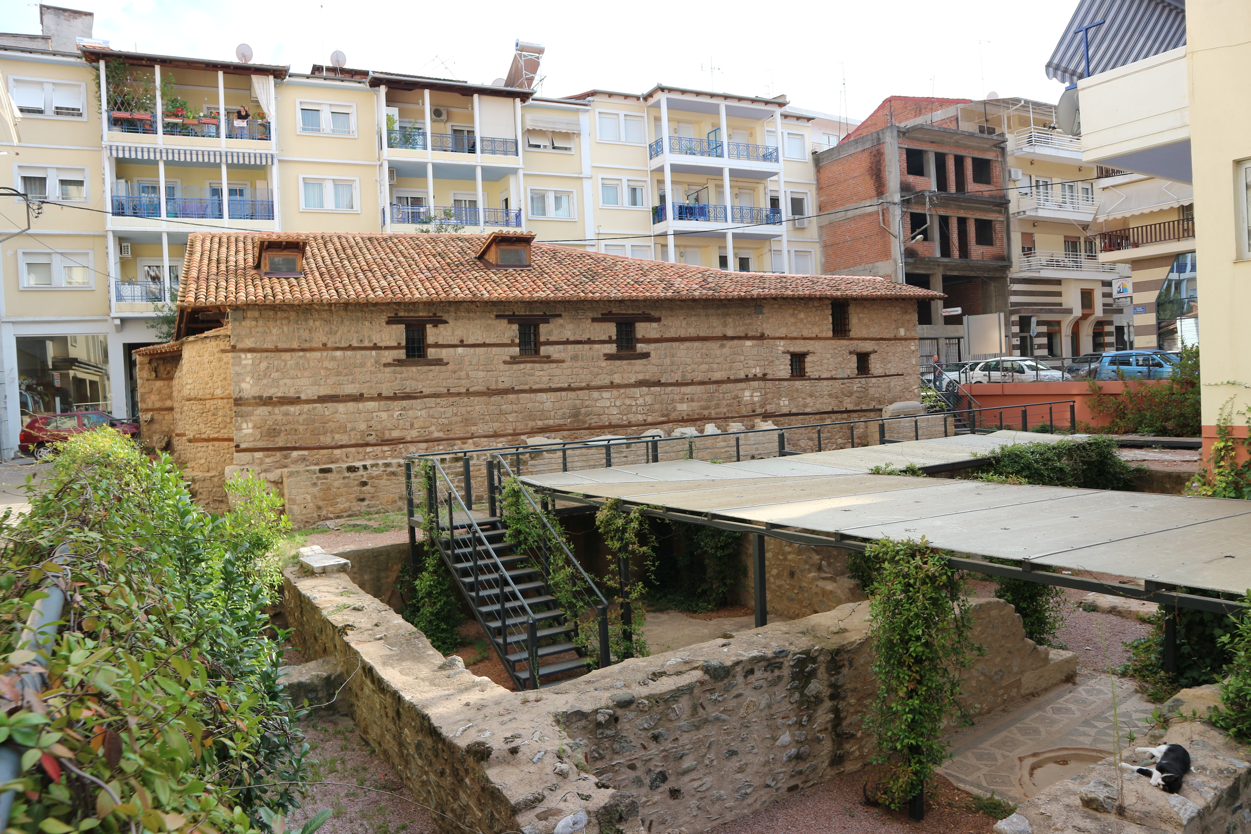 «Αρχαιολογικός χώρος Αγίου Παταπίου Βεροίας»